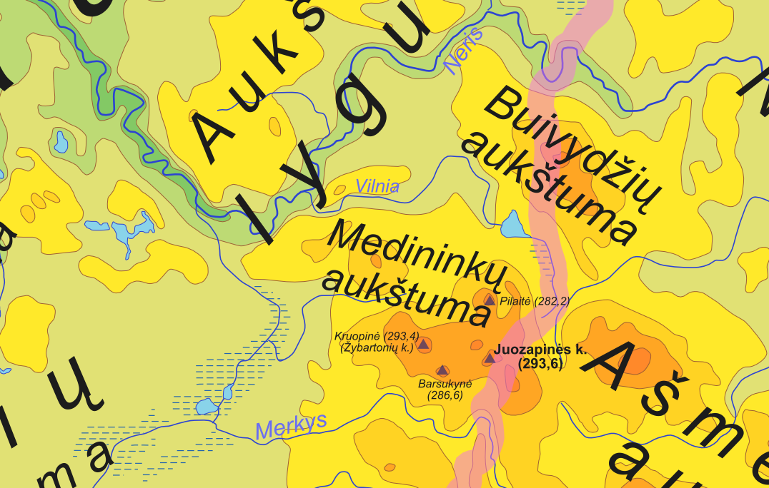 Juozapinės kalnas Created from Image:LithuaniaPhysicalMap-lt.svg